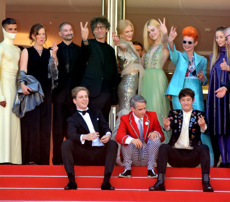 L'équipe du film "How to Talk to Girls at Parties " au festival de Cannes